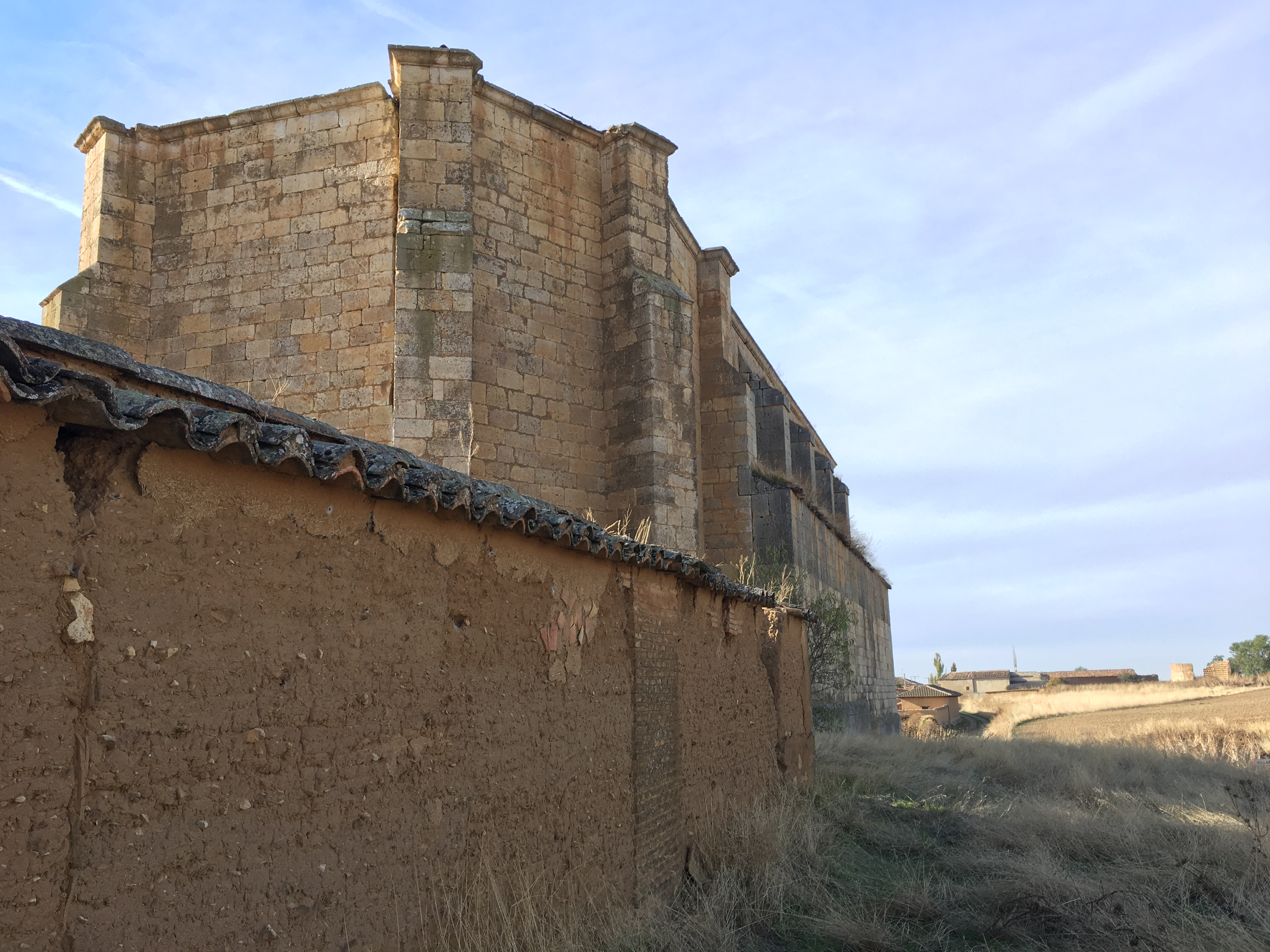 Villaesper Milenario